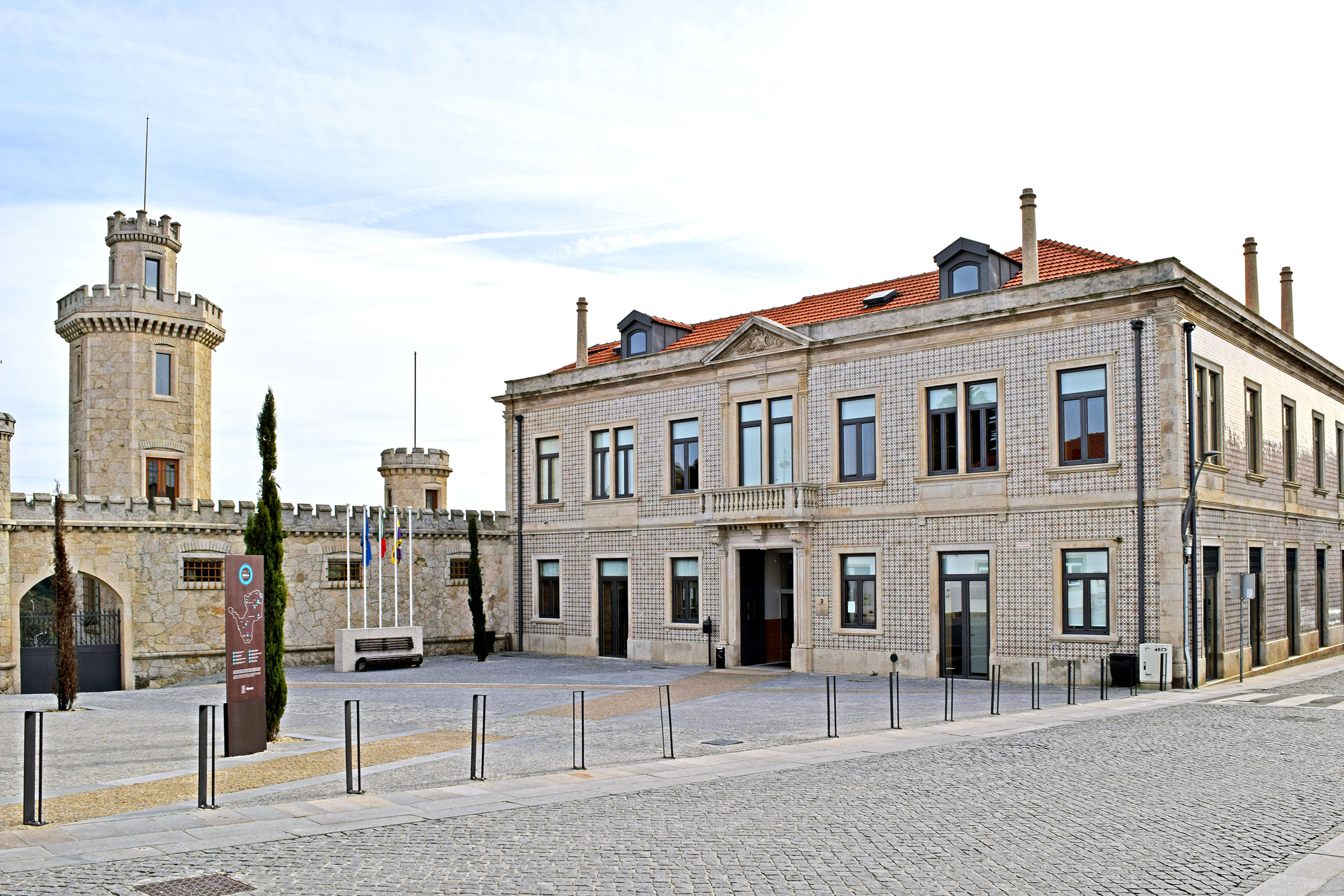 Localizada em Albergaria-a-Velha, é actualmente a Biblioteca Municipal